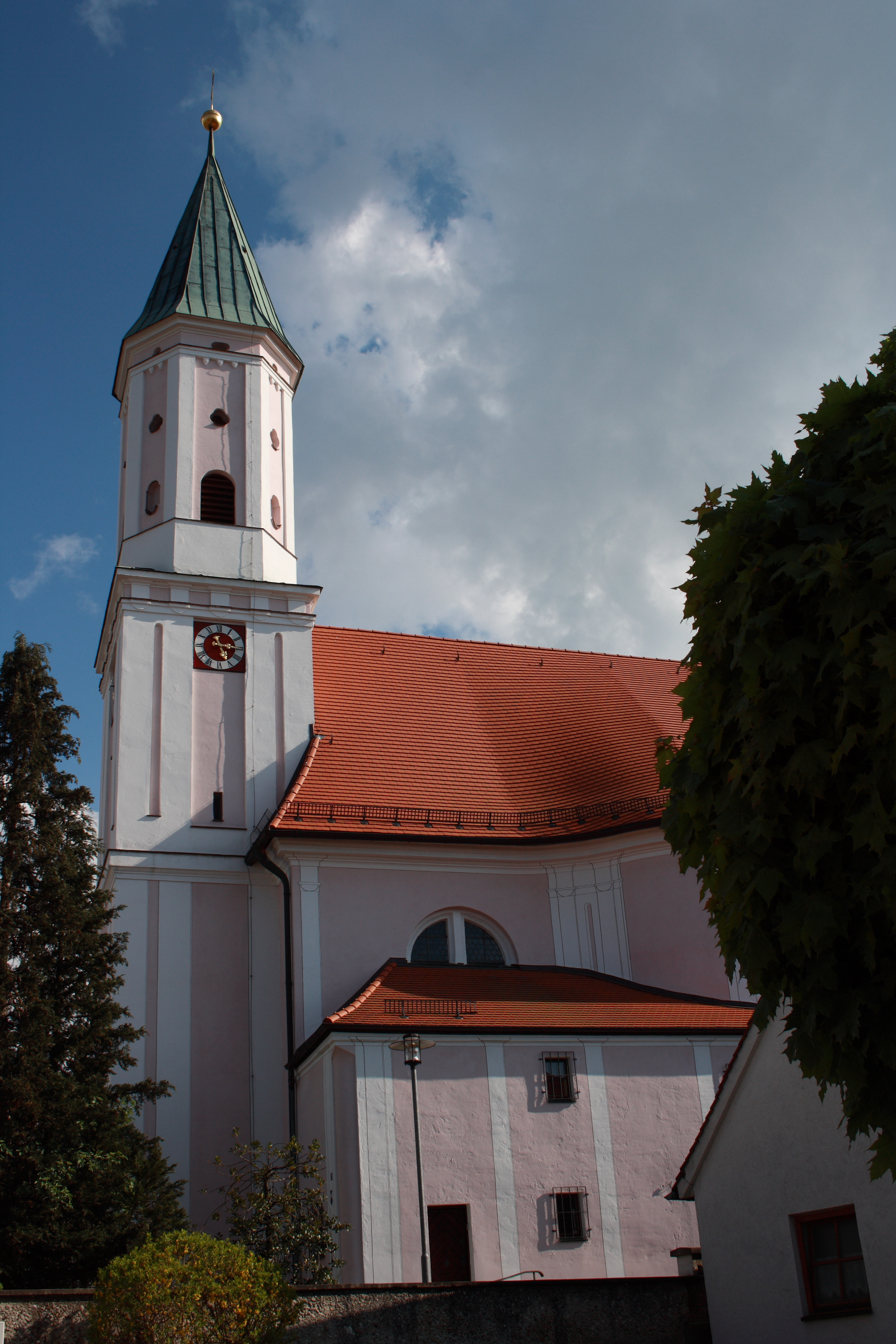 Katholische Pfarrkirche St. Vitus in Langweid am Lech im Landkreis Augsburg (Bayern)